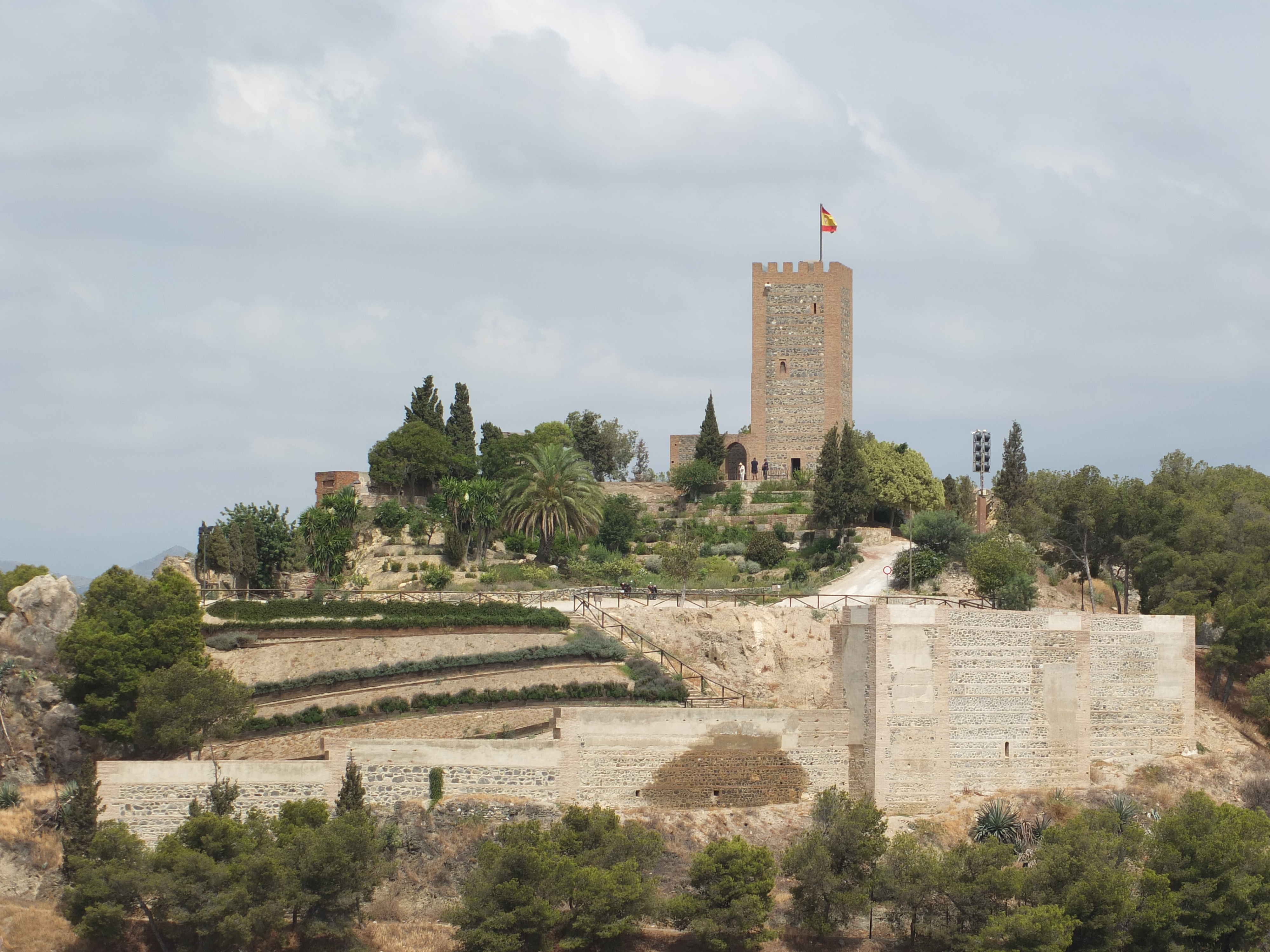 Castillo de Vélez-Málaga, Spain